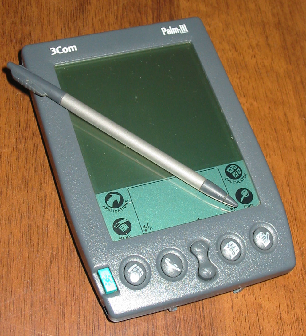 КПК Palm III